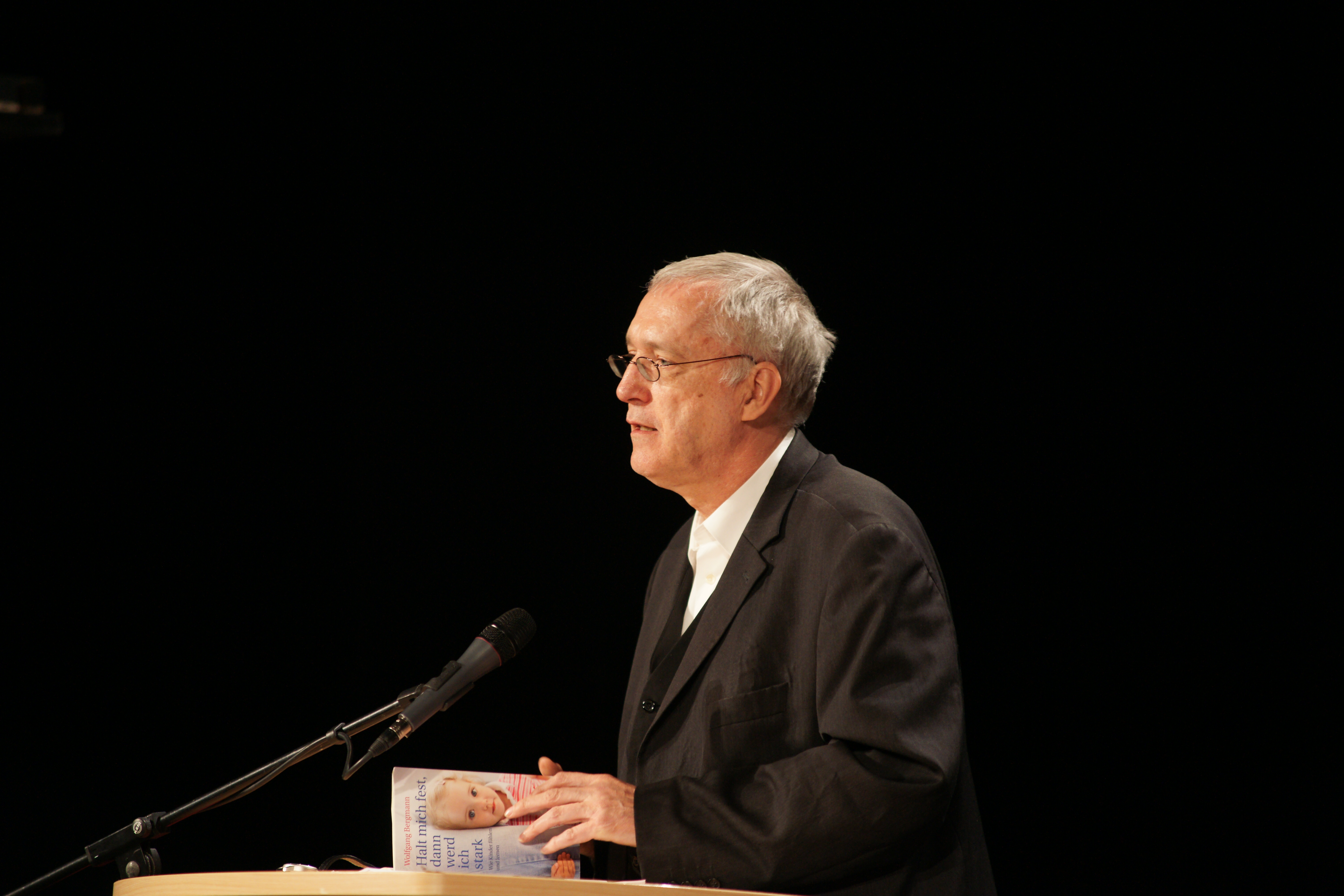 Wolfgang Bergmann, Alte Oper Erfurt, Verleihung des Matejcek-Preises (Familiennetzwerk) an Anna Zaborska und Petr Necas